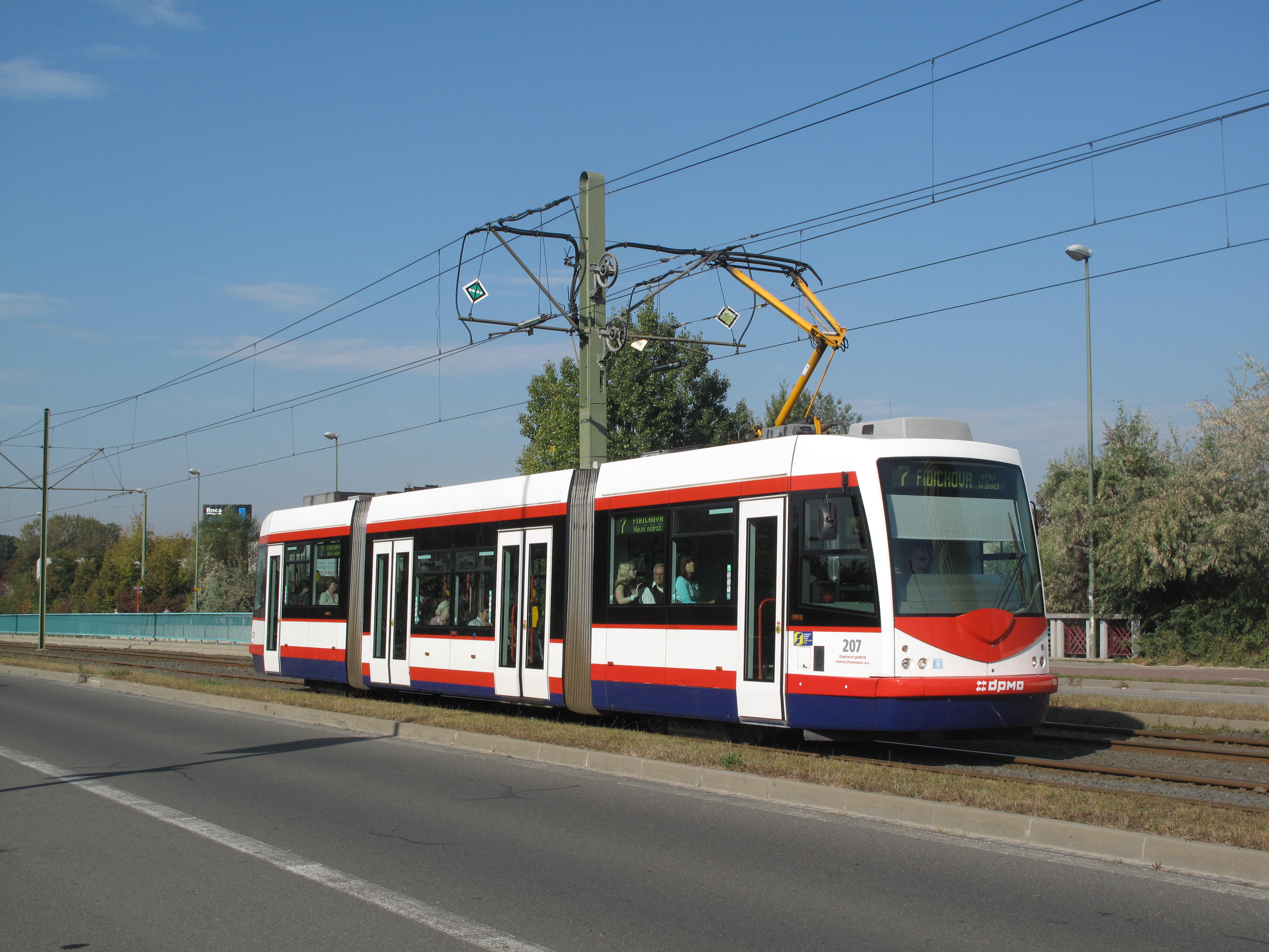 Česky: Olomouc